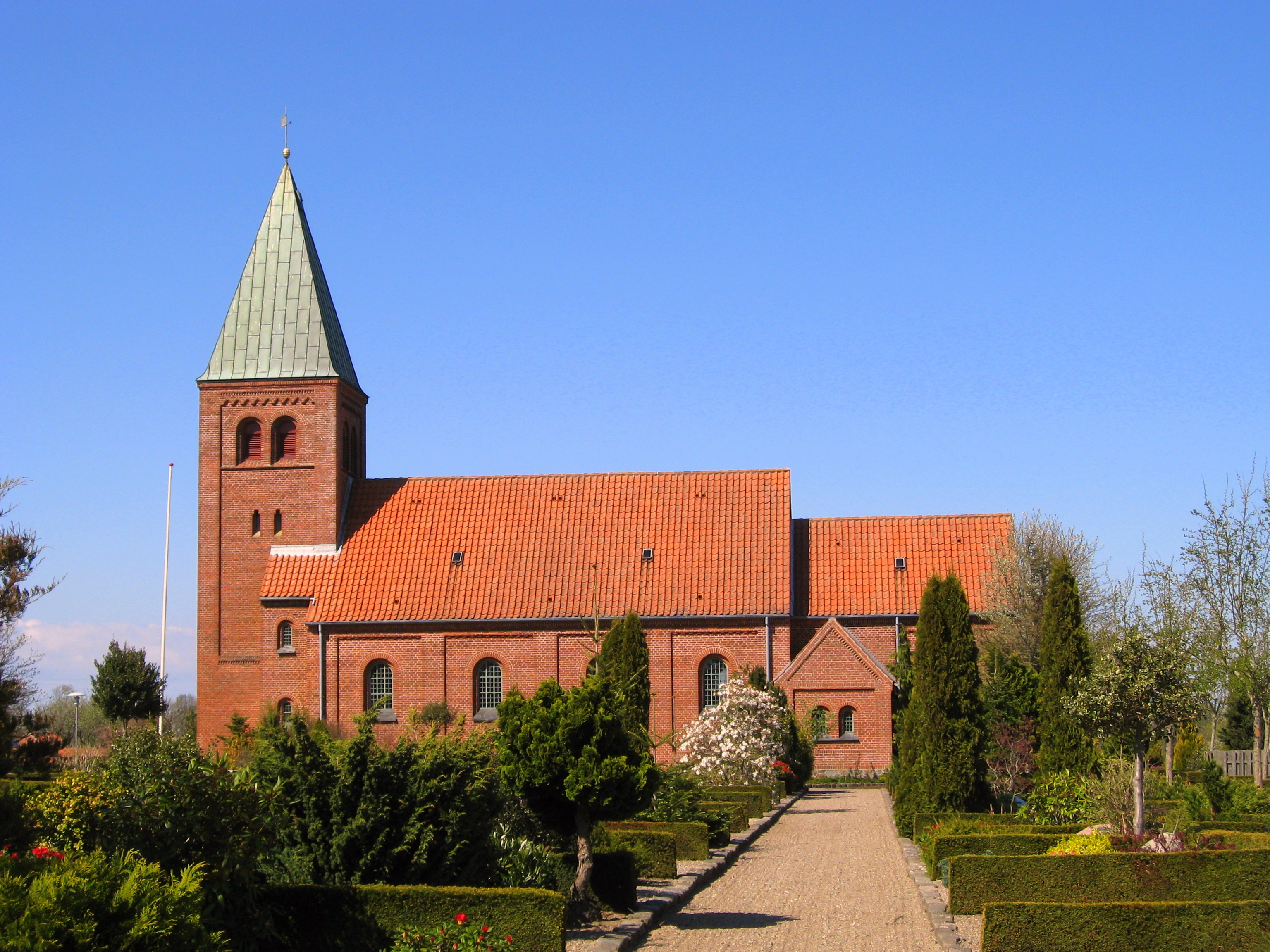 Agersted Kirke, Brønderslev Kommune